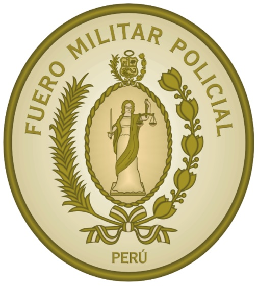 Logotipo del Fuero Militar Policial Peru